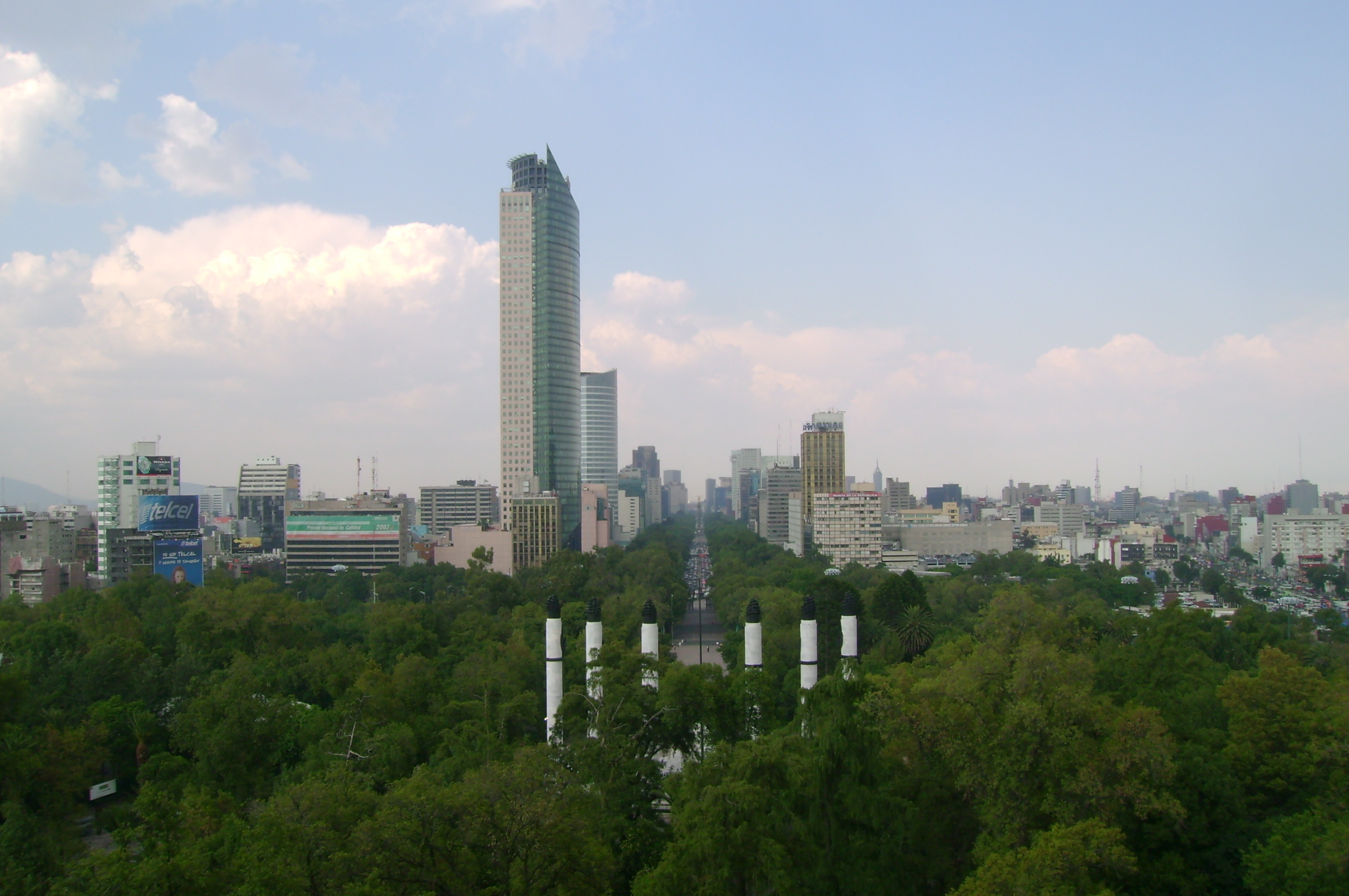 Vista de Paseo de la Reforma desde el Alcázar de Chapultec.